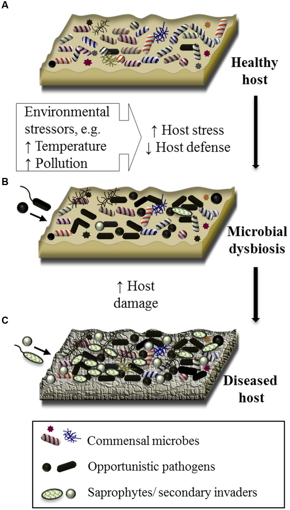 Dysbiose